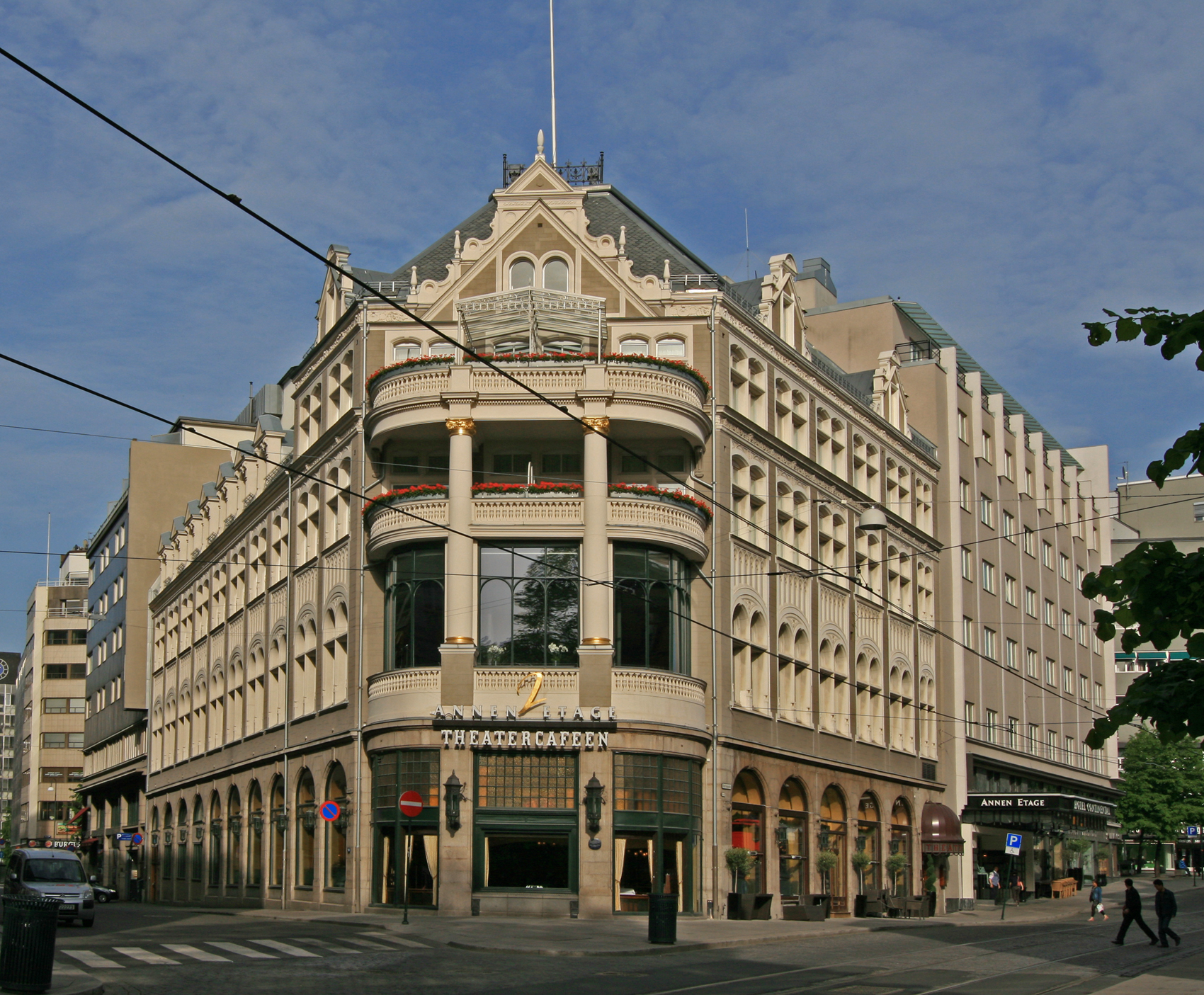 Hotel Continental, Oslo. Bygd 1900; arkitekt Ivar Cock. Nyere tilbygg i bakgrunnen oppført 1932; arkitekt Ole Øvergaard.